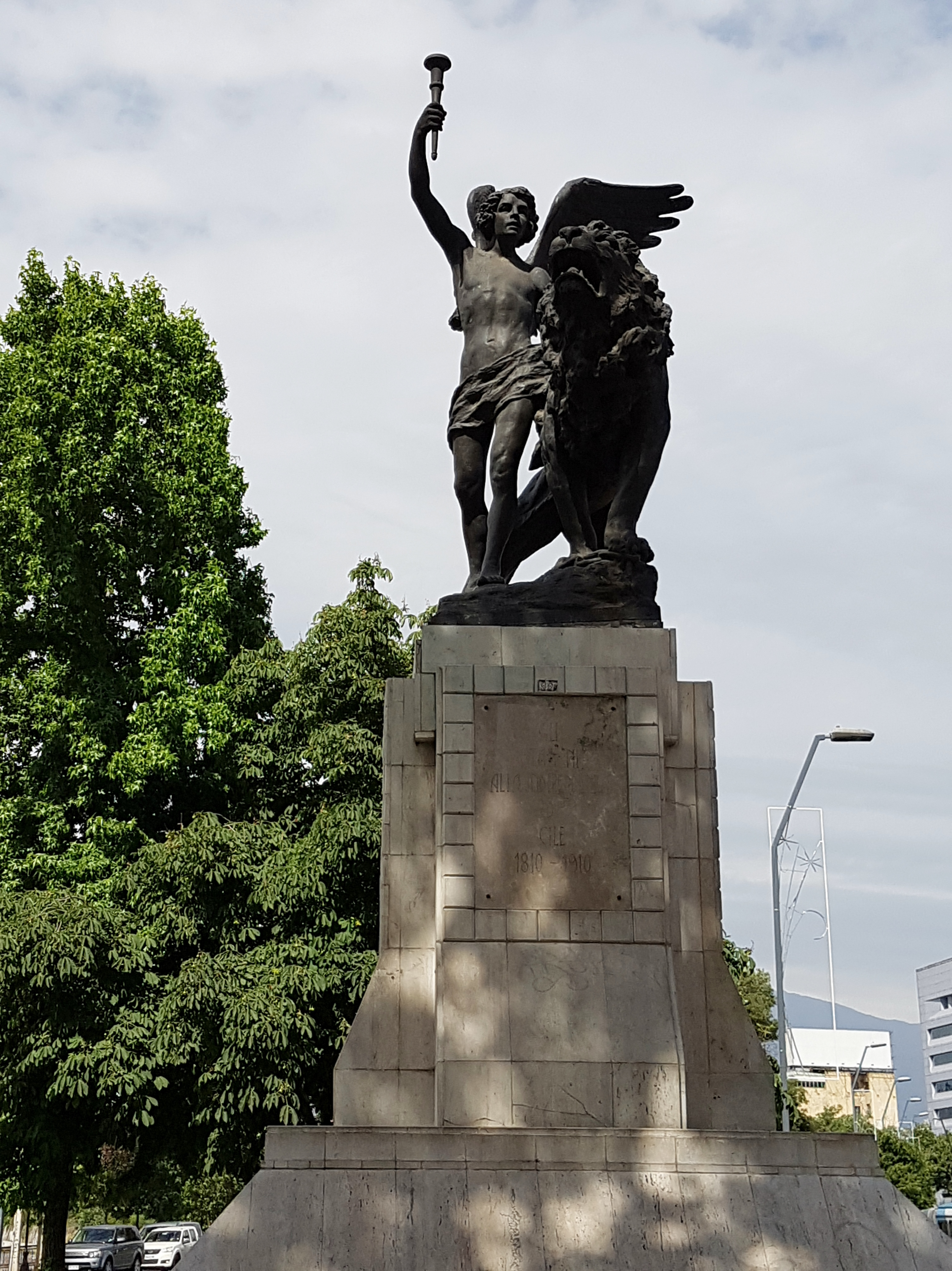 Monumento al genio de la libertad, del escultor italiano Roberto Negri; plaza Baquedano, Santiago de Chile.